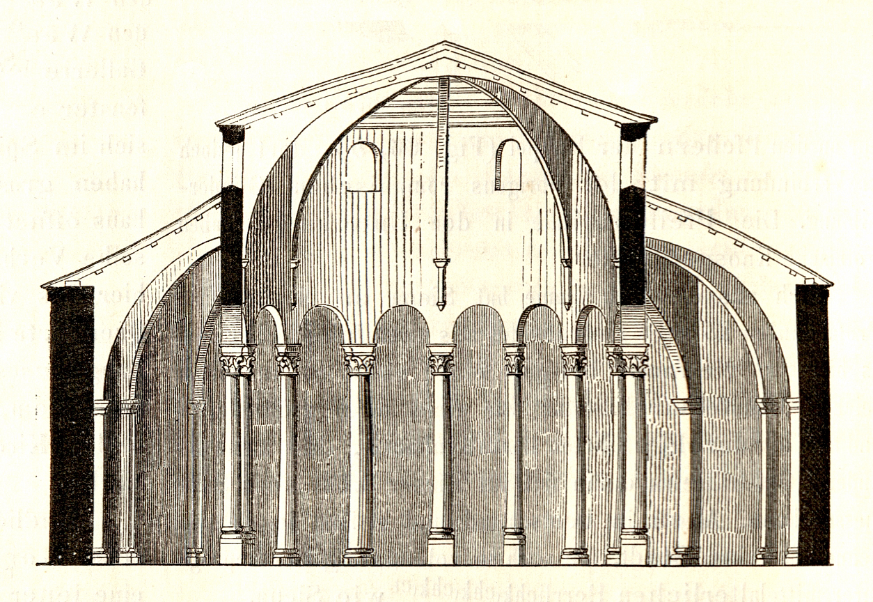 Holzschnitt aus den Mittheilungen der kaiserl. königl. Central-Commission zur Erforschung und Erhaltung der Baudenkmale Band 5, 1860. Beitrag von Wilhelm Lübke mit dem Titel: „Reisenotizen über die mittelalterlichen Kunstwerke in Italien“, 1858/1859, gemeinsam mit Karl Schnaase Druck: k. k. Hof- und Staatsdruckerei Zuordnung der Zeichnungen entsprechend dem Dateinamen